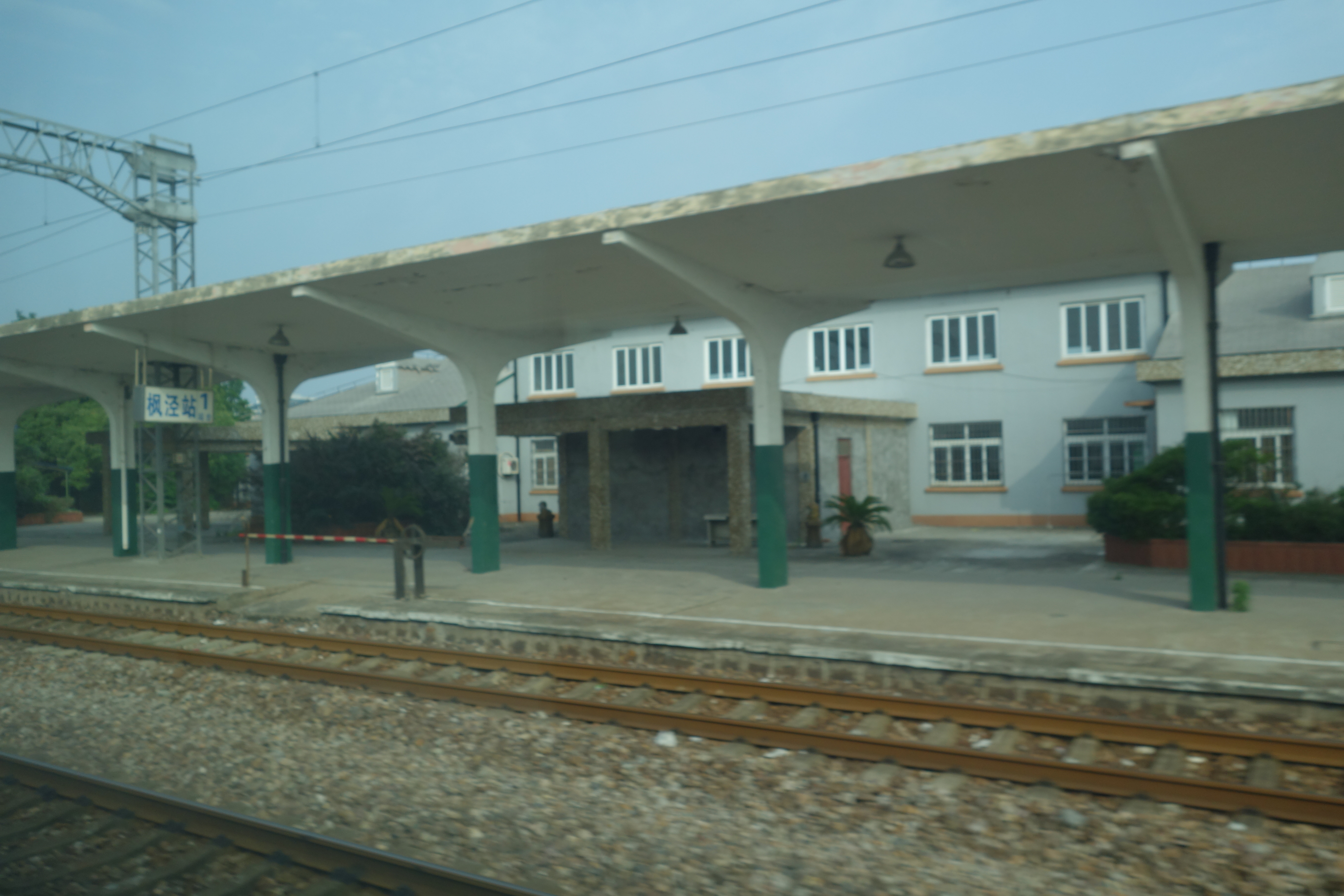 枫泾站站台